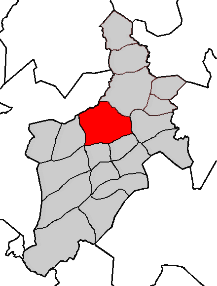 Situación da parroquia de Abegondo no concello de Abegondo